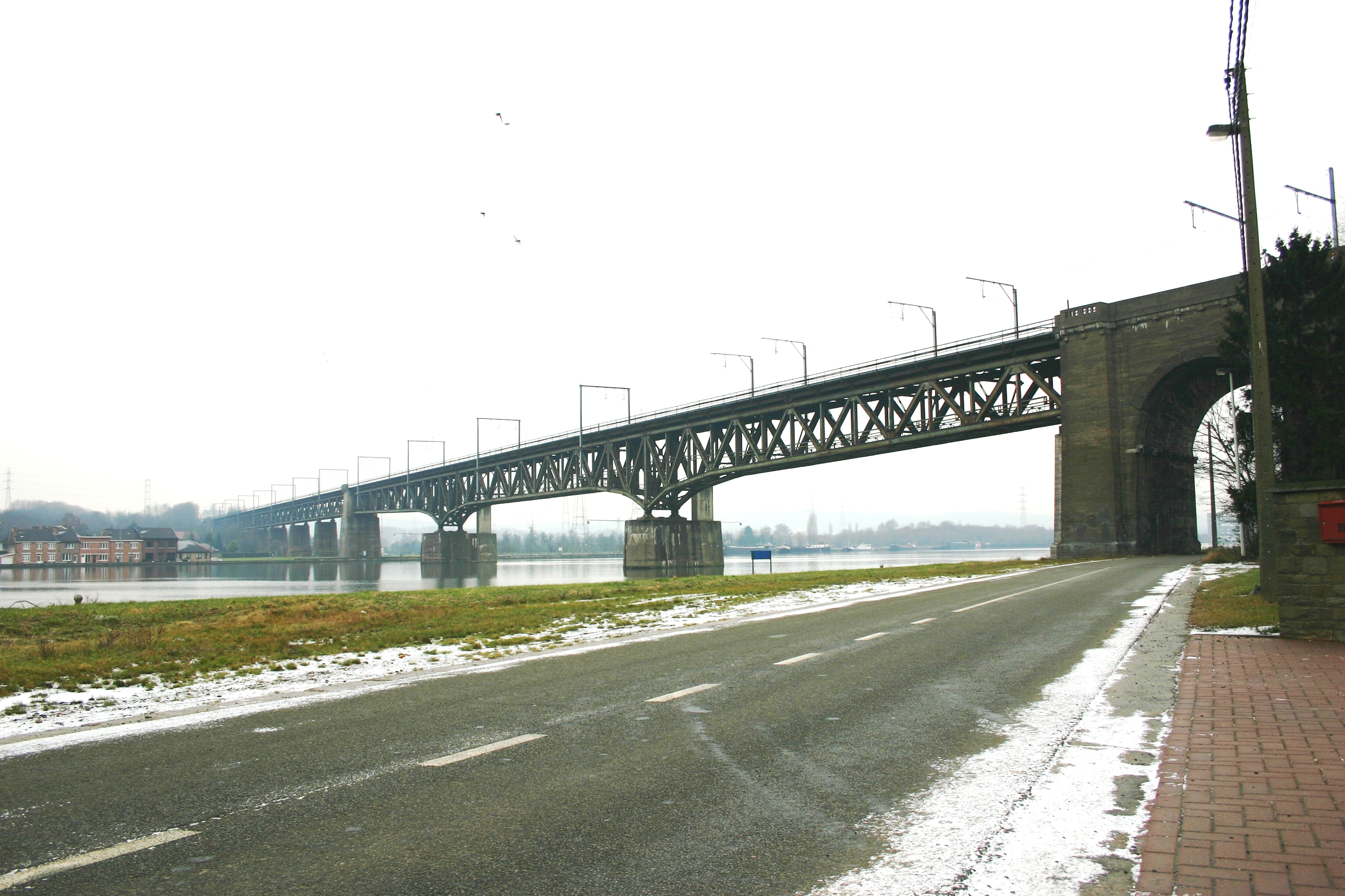 Däitsch Bréck vu Visé, di 3 éischt Felder a Cantileverbauweis.